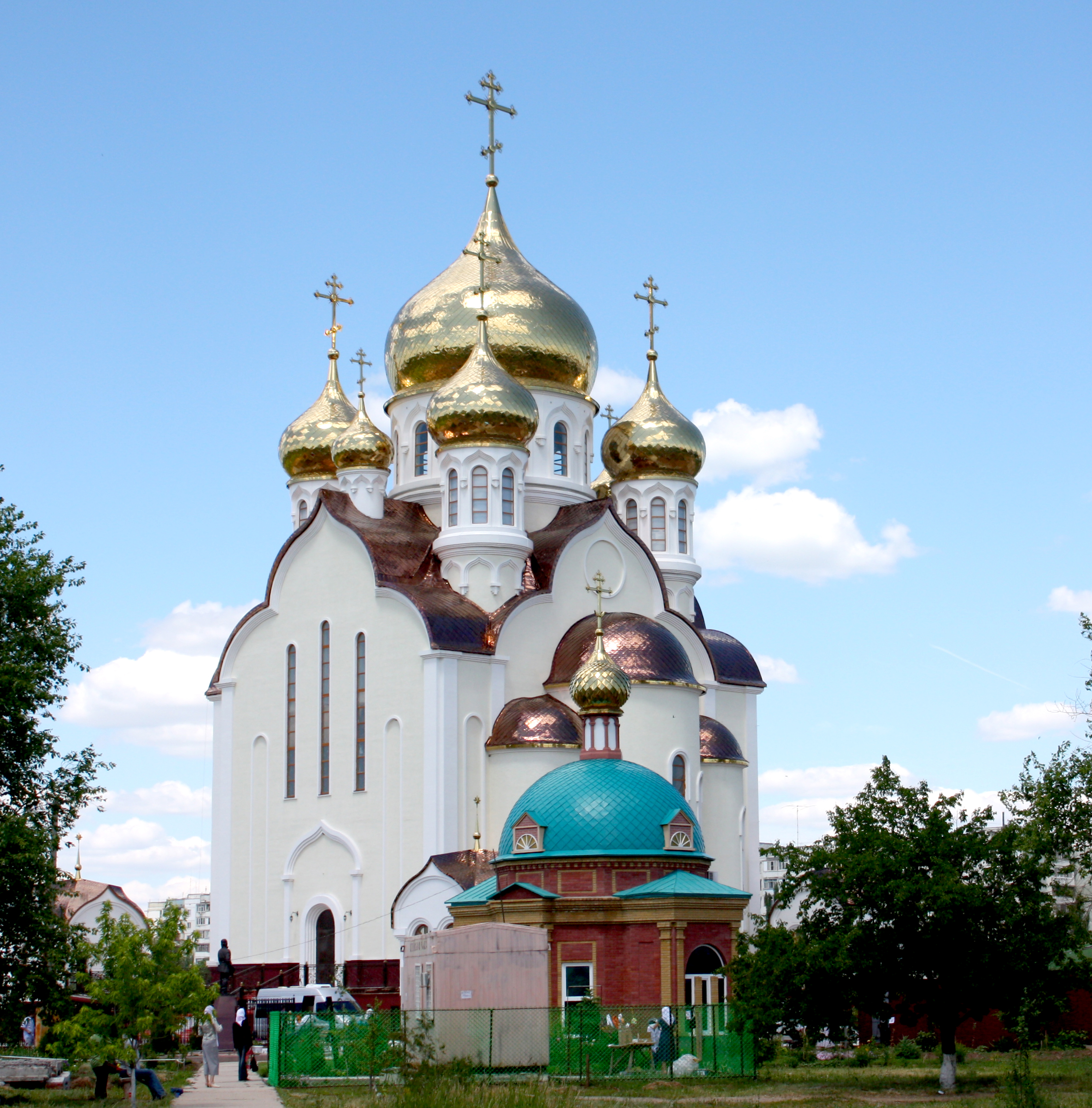 Храм Рождества Христова в Волгодонске